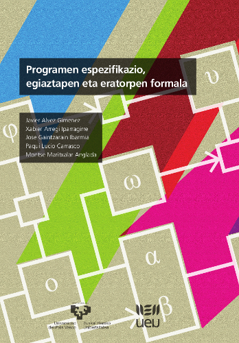 'Programen espezifikazio, egiaztapen eta eratorpen formala' liburuaren azala (UEU, 2016)